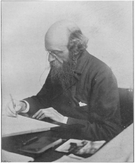 Perre Cuypers in 1905